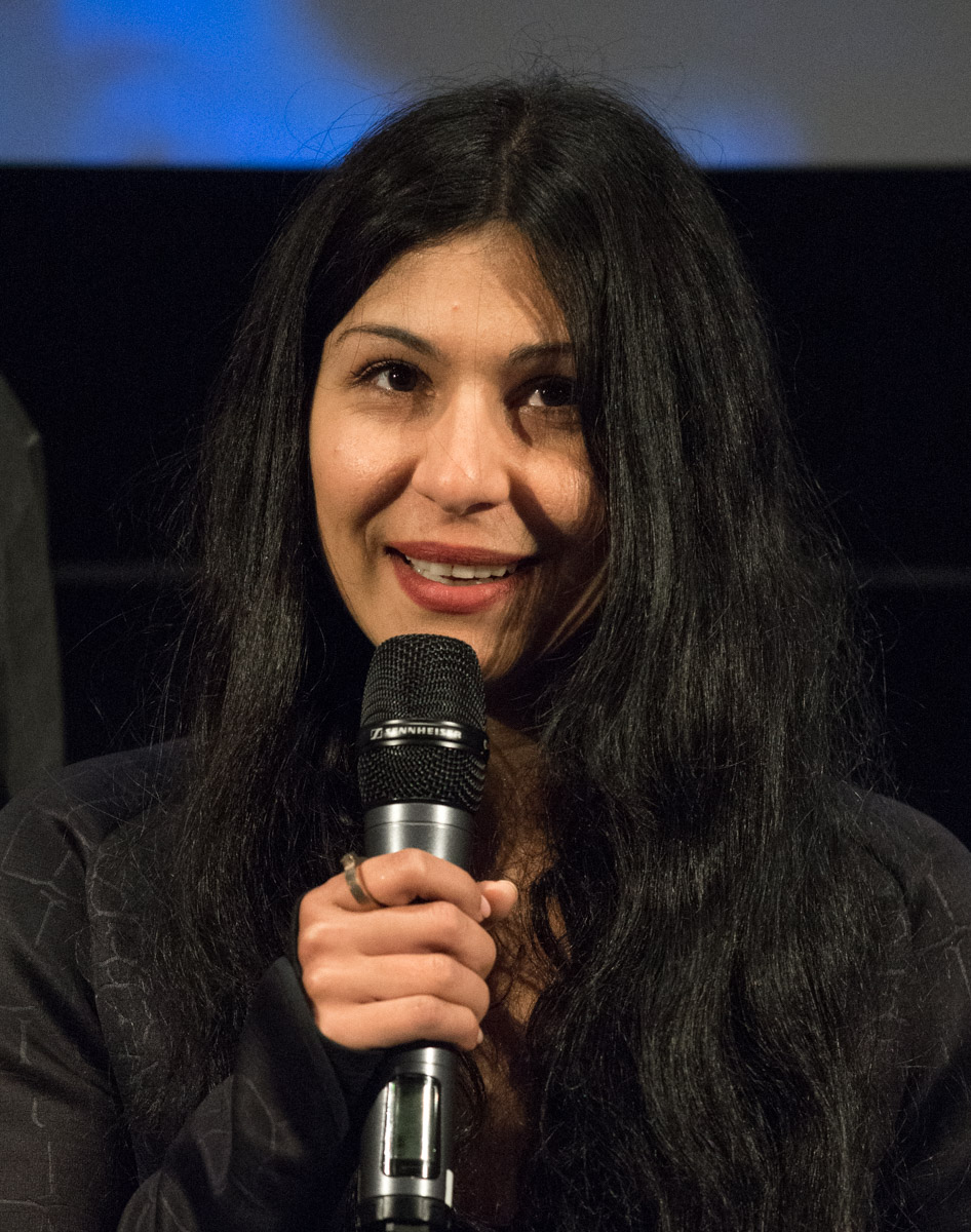 Bahar Pars under presentationen av den Svenska filmhösten i Filmhuset i Stockholm den 17 augusti 2015.